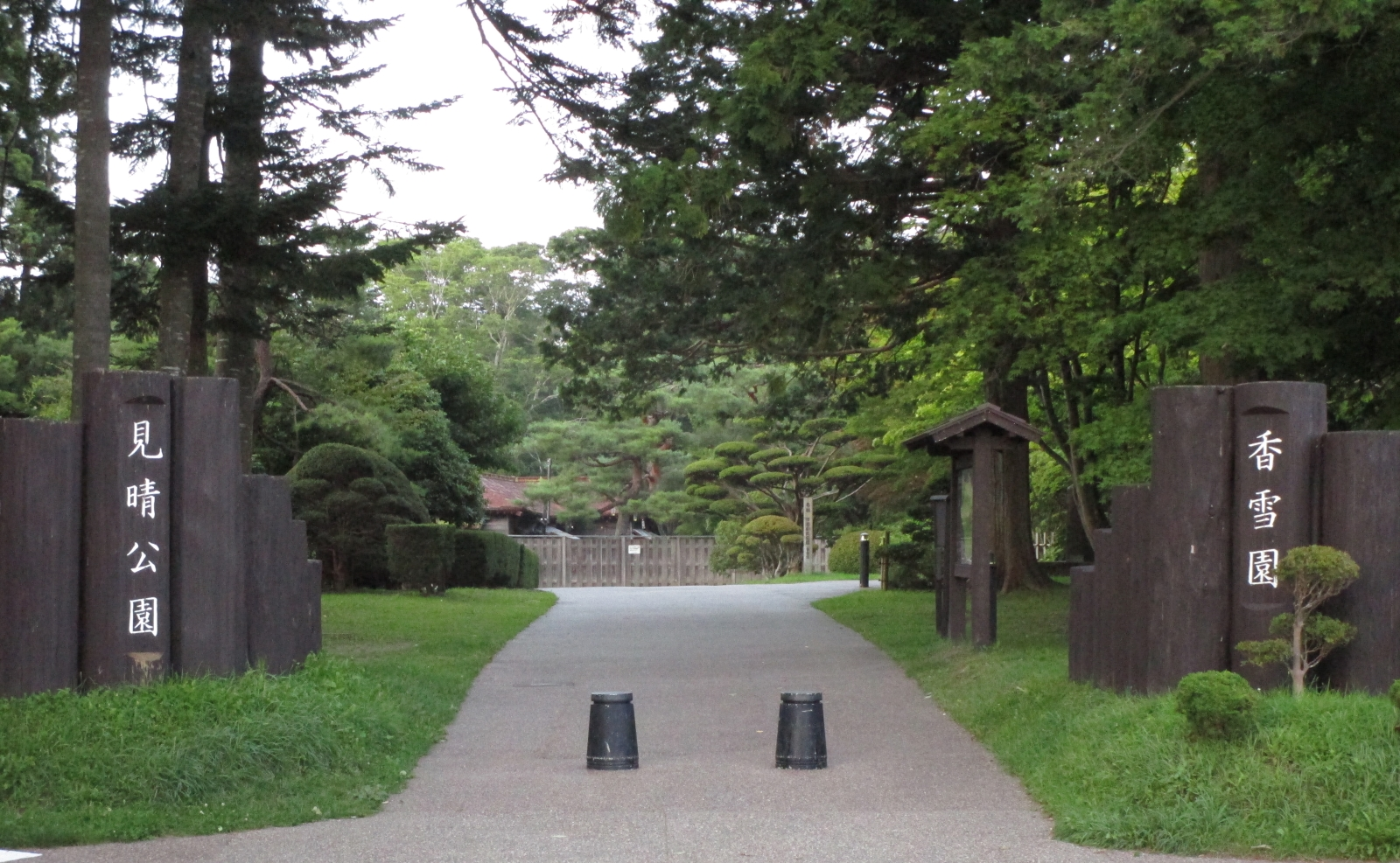 見晴公園（香雪園）入口